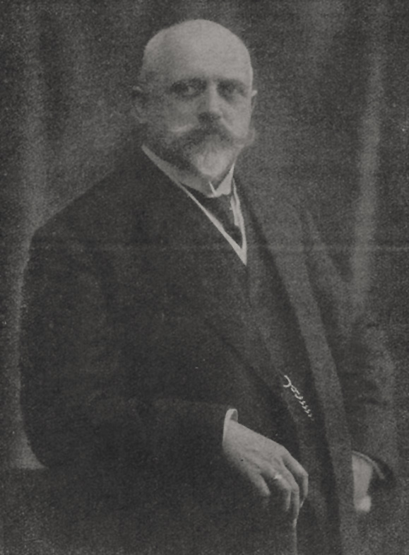 Kunstmaler Theodor Groll jun. ist in der Nacht zum 3. April in Düsseldorf gestorben (Foto vor 1913)